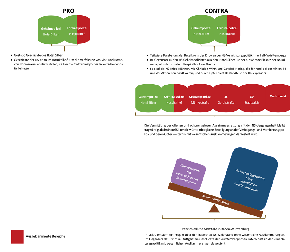 Geheimpolizei und ein Teil Kriminalpolizei: PRO und CONTRA